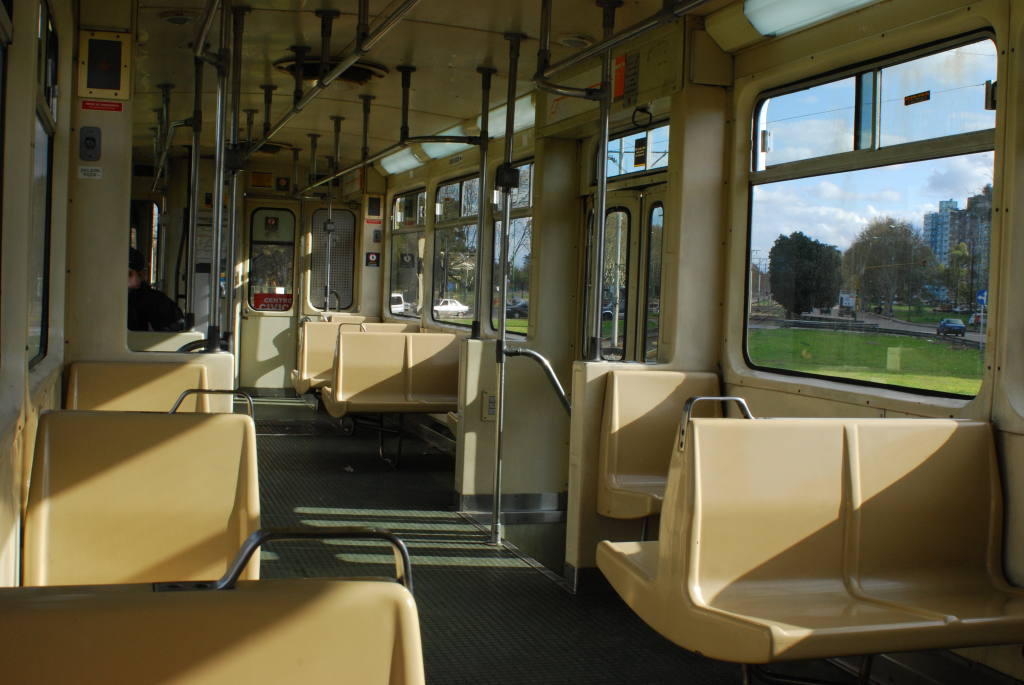 Interior del premetro de Buenos Aires creca de la estación Gral. Savio en un atardecer de septiembre